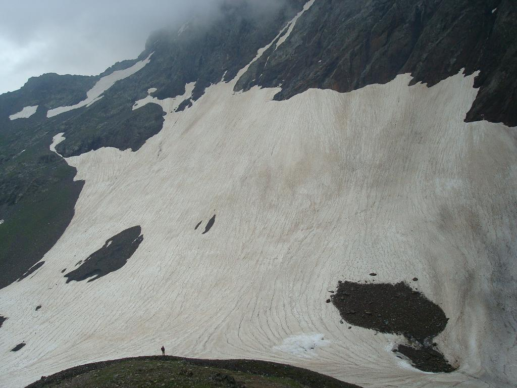 Ледник Сахарный в массиве Псеашхо. Фотография сделана в августе 2007 года во время походв в горы Западного Кавказа